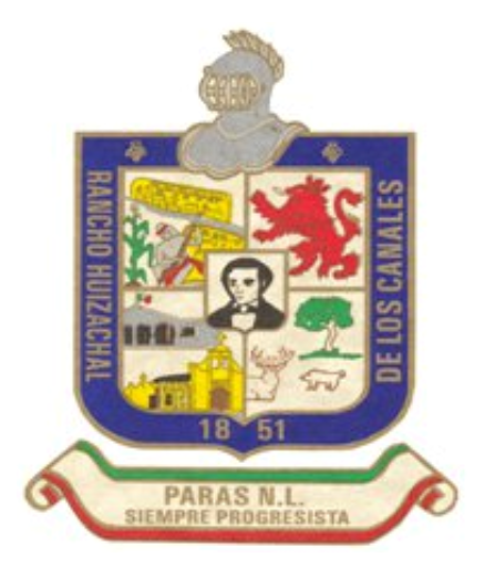 El escudo es rectangular presentando en la parte superior un yelmo de armadura, el remarco alberga el nombre “RANCHO HUIZACHALDE LOS CANALES”. En la parte superior del remarco se encuentran dos abejas símbolo del trabajo y en la parte inferior 1851, el año de su fundación. La parte interna del escudo se divide en cuarteles: en el primer cuartel se encuentra una gráfica del Frontón de Piedras Pintas y un originario labrando la tierra, en el cuartel superior izquierdo se encuentra el león rampante símbolo del estado. En el cuartel inferior izquierdo, se encuentran la fachada de la presidencia municipal; la Escuela Primaria y la Iglesia del Sagrado Corazón de Jesús. En el cuartel inferior derecho un árbol anacahuita; la cabeza de un venado cola blanca y un jabalí, abundantes en la región. En esta parte central se encuentra la fotografía de José María Parás y Ballesteros primer gobernador Constitucional del Estado y en su honor lleva el municipio. En la parte inferior del escudo lleva una banda tricolor donde se lee el nombre y lema del municipio: PARAS, N.L., SIEMPRE PROGRESISTA.